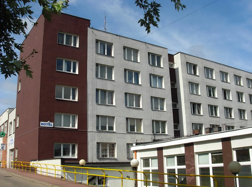 Hotel Polskiego Związku Niewidomych ul. Powstańców Wlkp 33 w Bydgoszczy